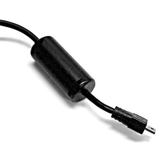 foto ferrietkraal aan USB kabel, eigen foto Caseman nov 2004